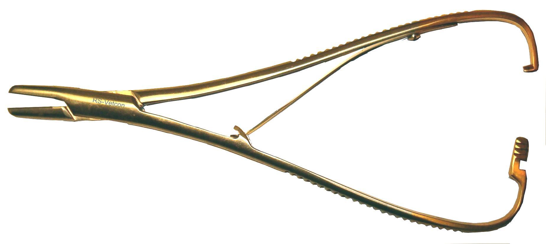 Naaldvoerder